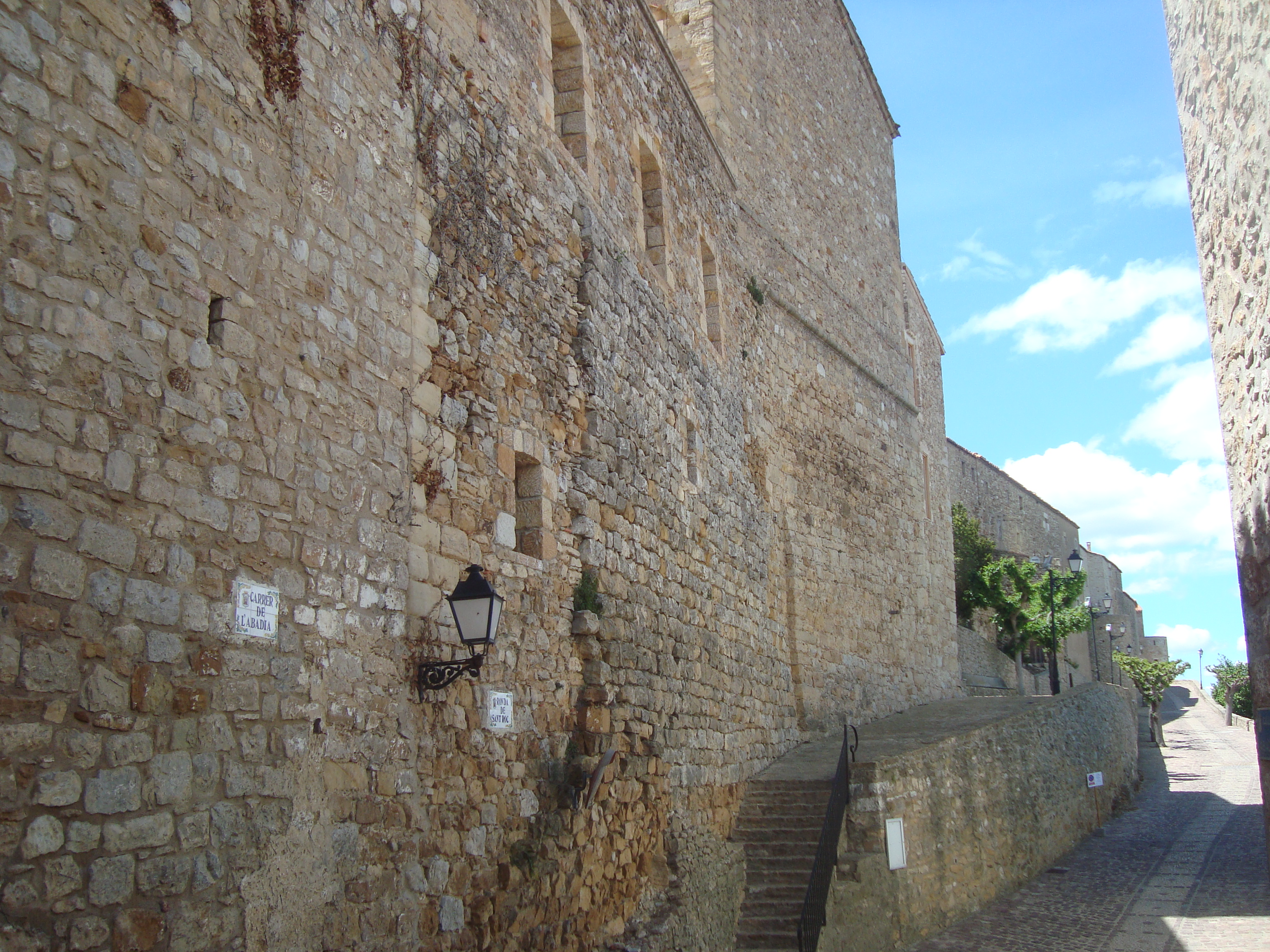 Castell i muralla (Culla)